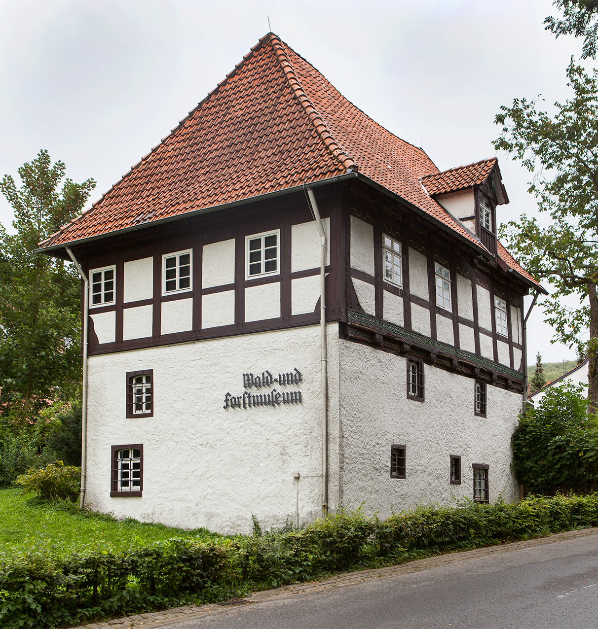 Schlossmühle von 1537 und ehemaliges Forsthaus Heidelbeck (Heute: Wald- und Forstmuseum) This is the photograph of an architectural monument. It is part of the list of cultural monuments of Kalletal, no. 4